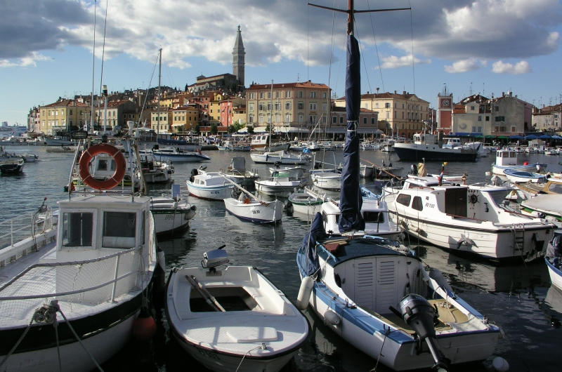 Rovinj, Croatia